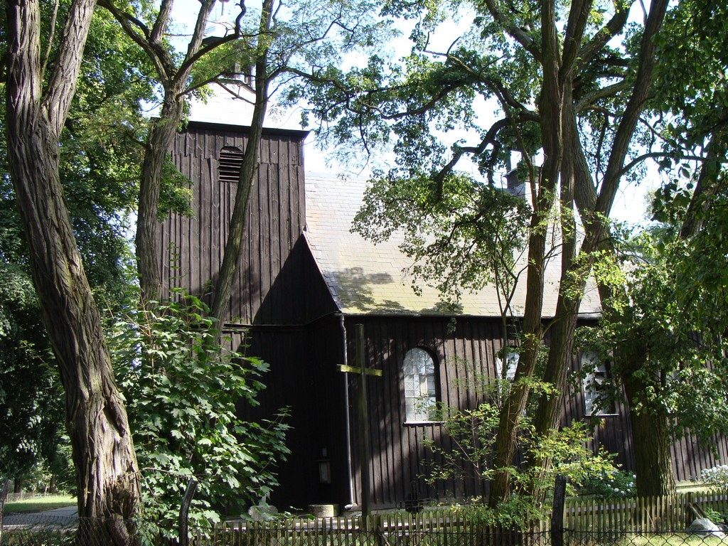 Błociszewo - Kościół pw. św. Michała Archanioła z 1736 roku (2415/A)